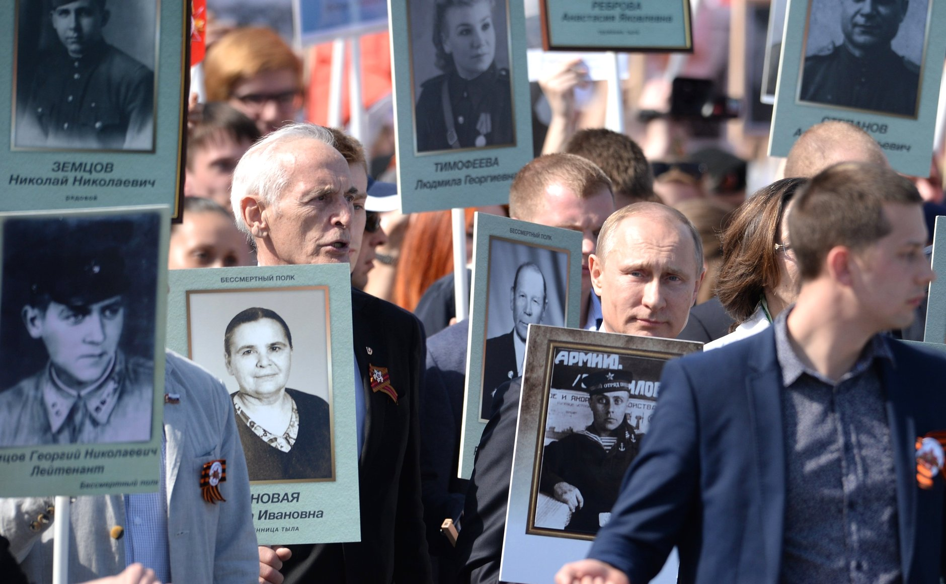 Шествие региональной патриотической общественной организации «Бессмертный полк» В День Победы Владимир Путин принял участие в акции «Бессмертный полк». Глава государства с портретом своего отца-фронтовика присоединился к шествию колонны на Красной площади.